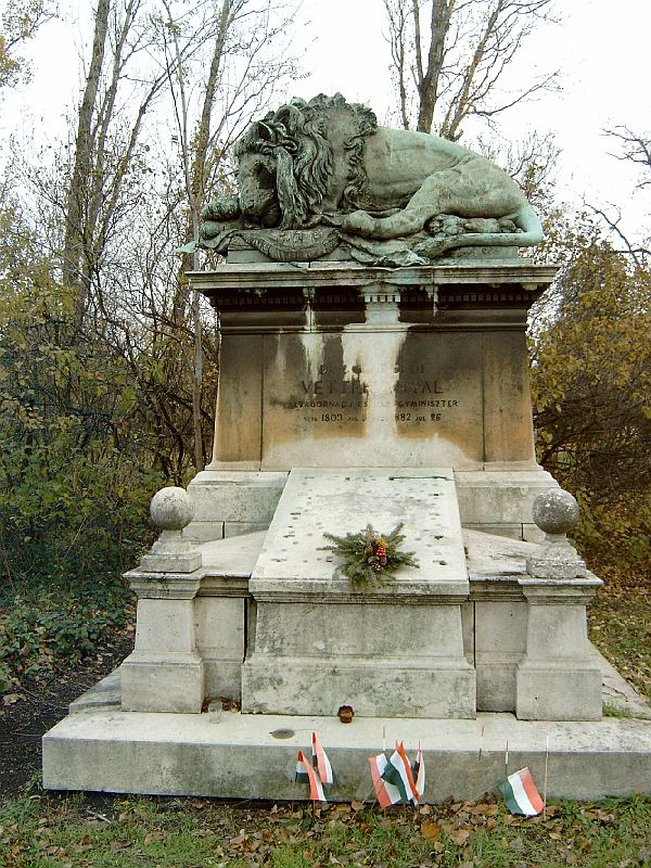 Vetter Antal sírja Budapesten. Kerepesi temető: 24/1-körönd.